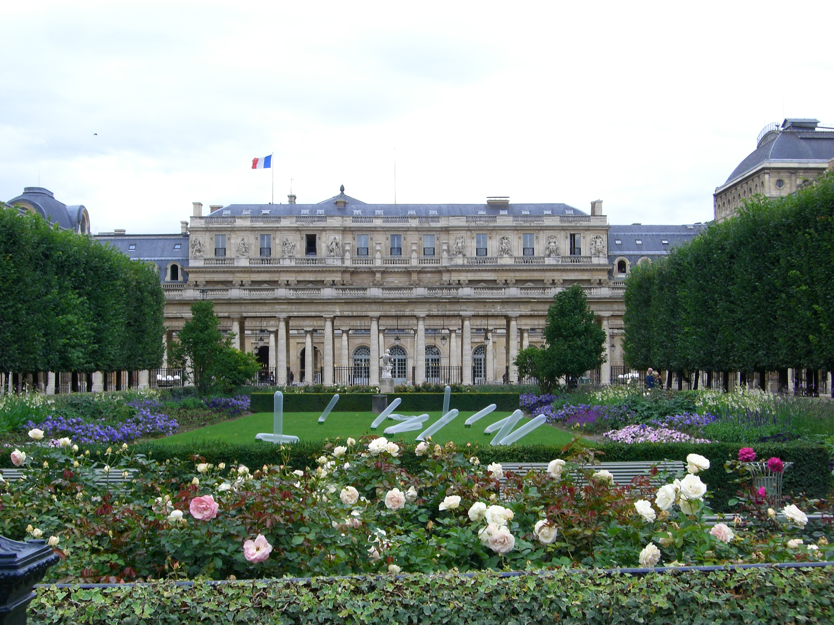 Palais-Royal, Paris